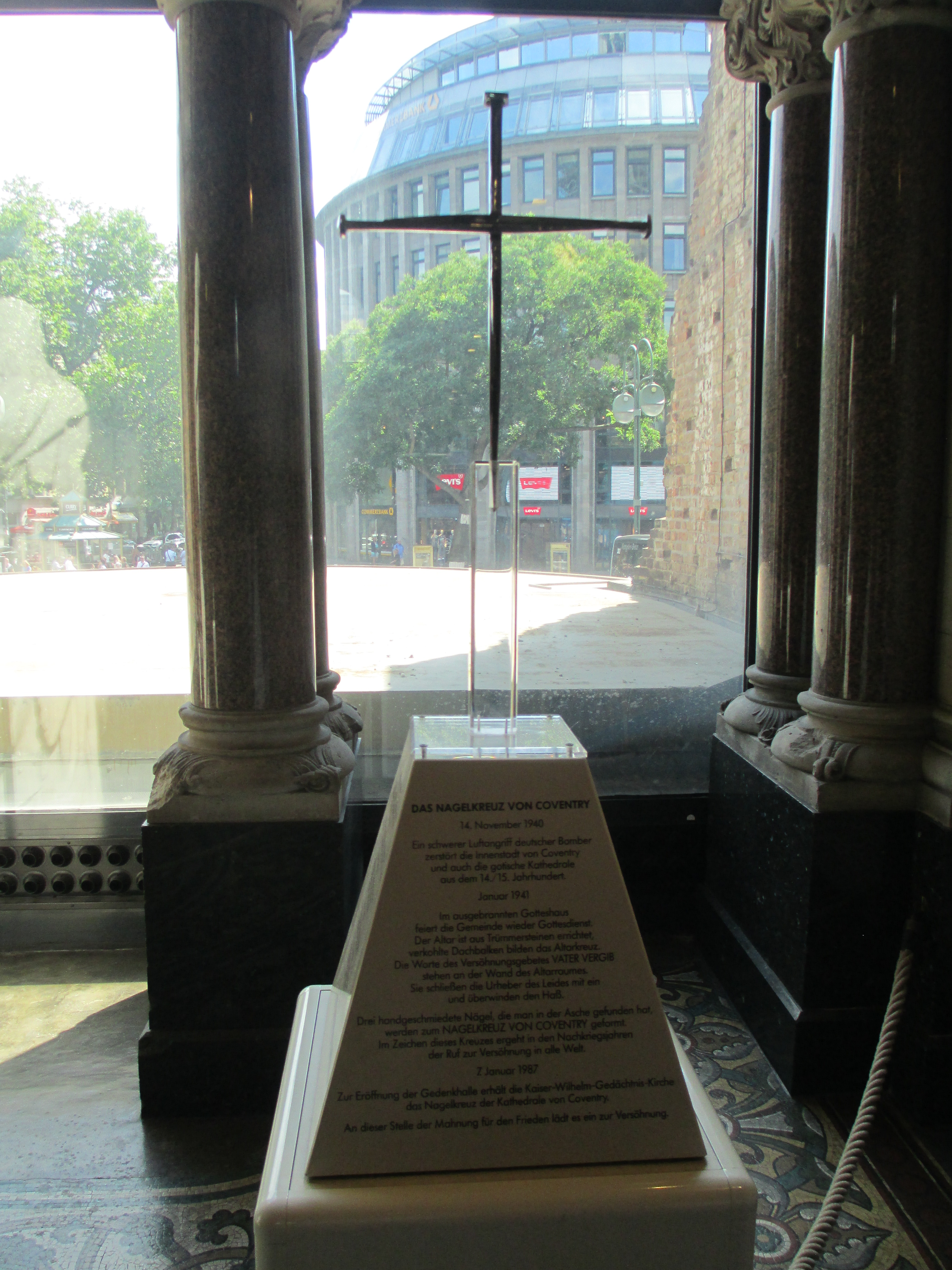 צלב קובנטרי בכנסיית הזיכרון לקיסר וילהלם בברלין